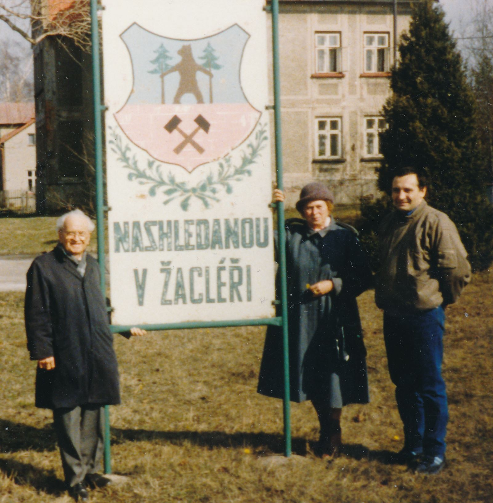 Ota Hora s manželkou Ludmilou na cestě k Růžovému paloučku v Žacléři